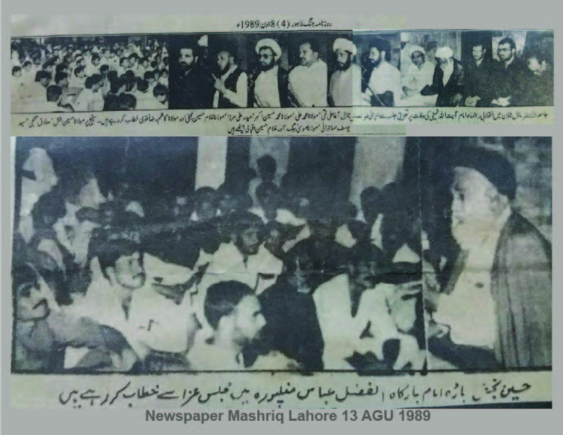 روزنامہ جنگ لاہور1989 ، روزنامہ مشرق لاہور1989